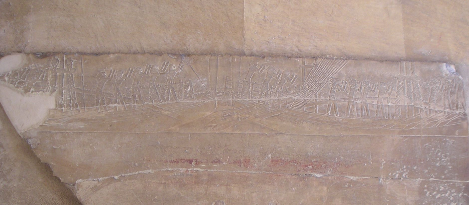 Relief de la chaussée d'Ounas représentant les navires escortant les grandes barges de transport lors de leur arrivée au chantier de construction du temple funéraire du pharaon - Saqqarah - Ve dynastie